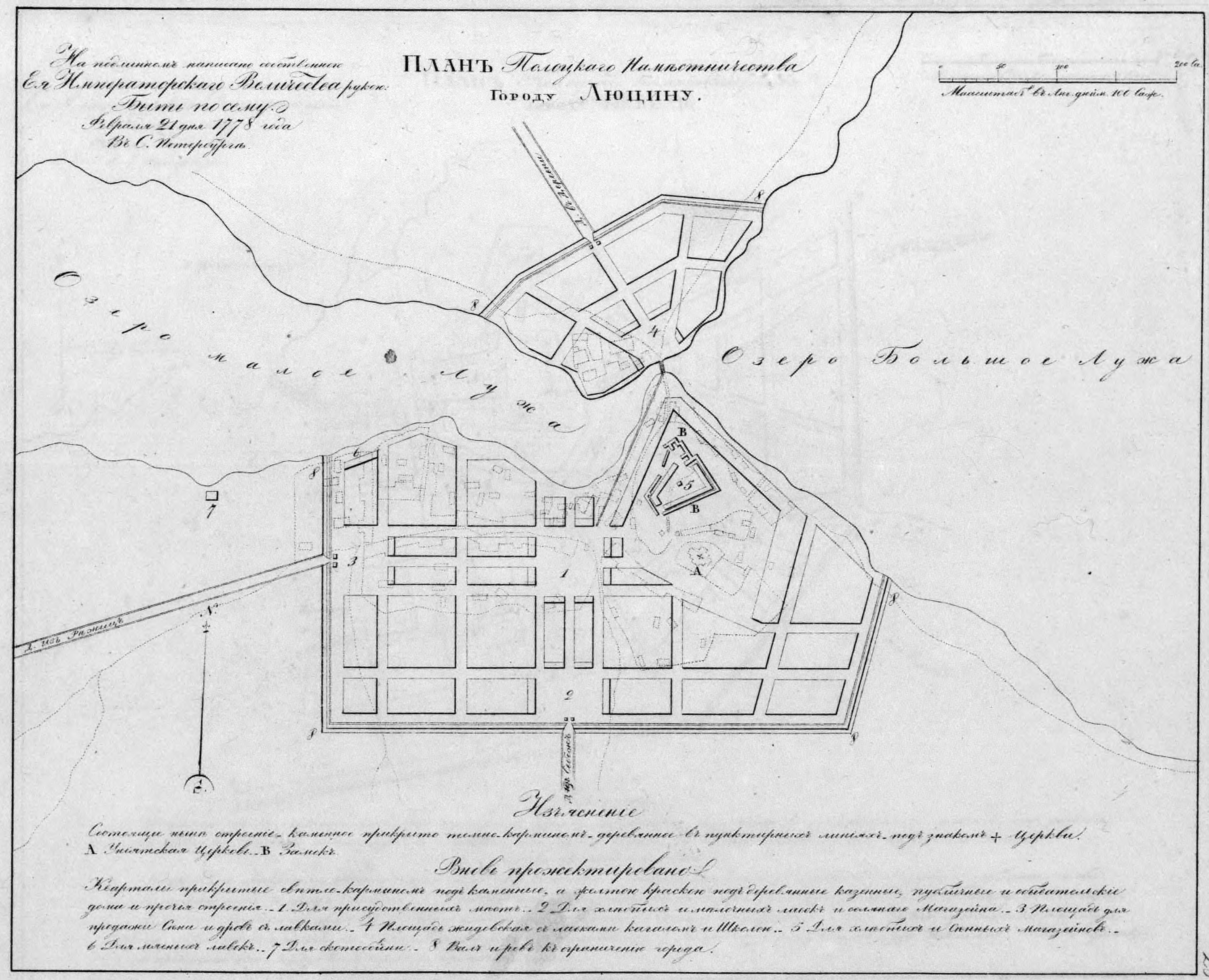 Полное Собрание Законов Российской Империи. Собрание первое. Книга чертежей и рисунков. (Планы городов).; 1839, Санктпетербургъ, Въ Типографіи II Отделенія Собственной Е. И. В. Канцеляріи.